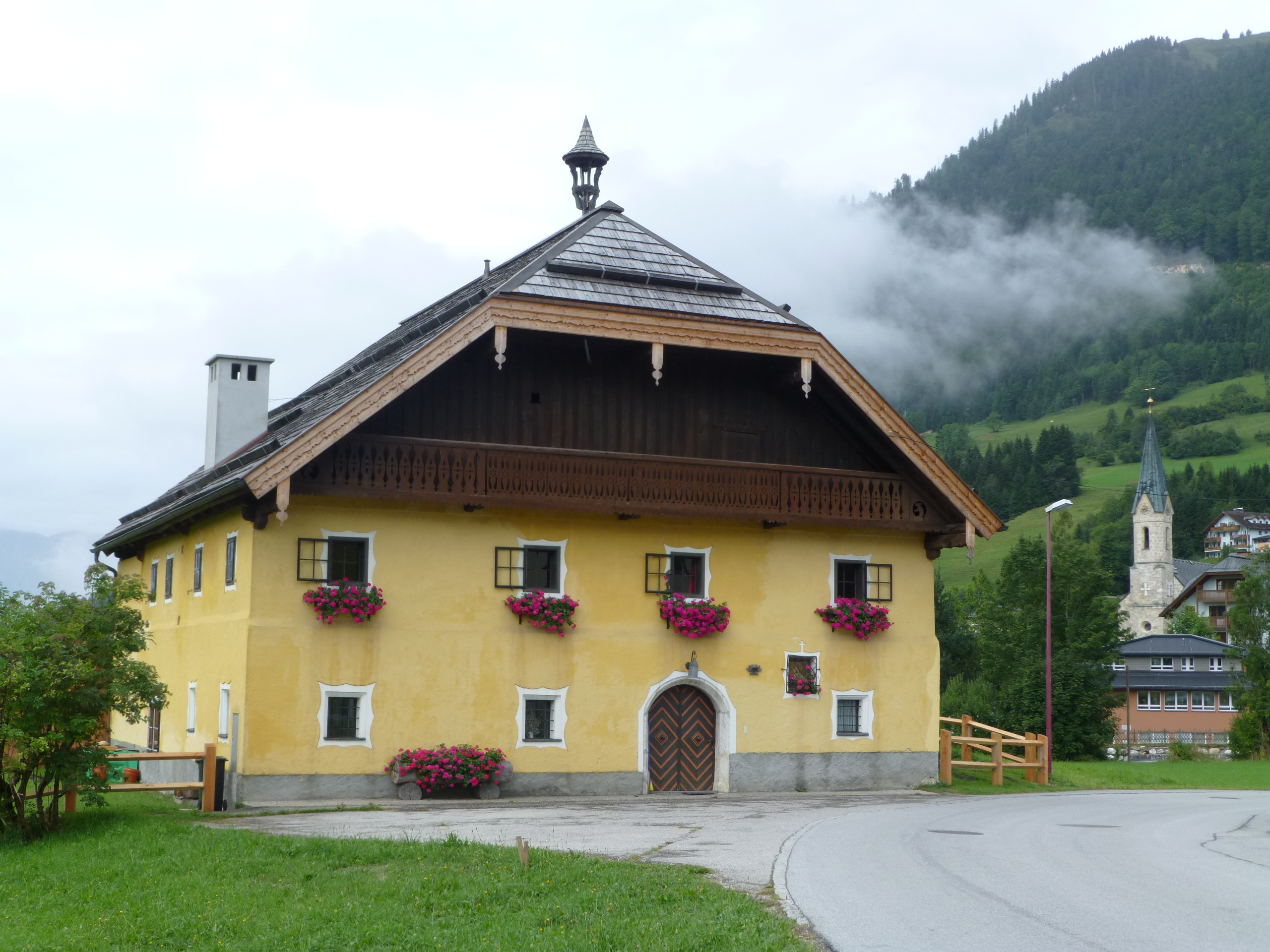 Maison rustique de 1598, pierre et bois, Rußbach am Paß Gschütt, district de Hallein, land de Salzbourg.